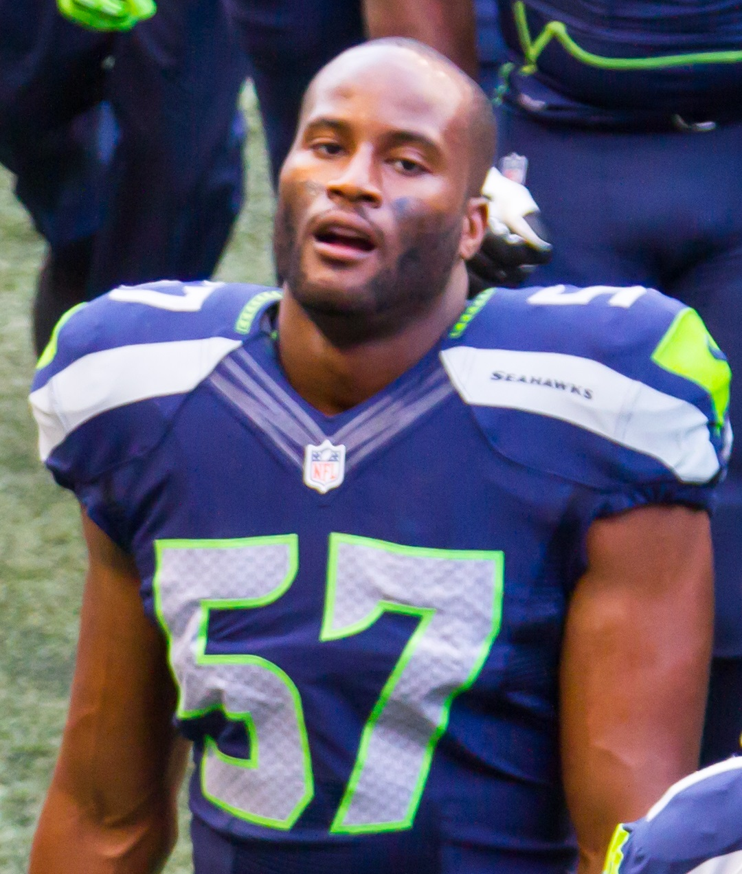 Mike Morgan in 2014 preseason